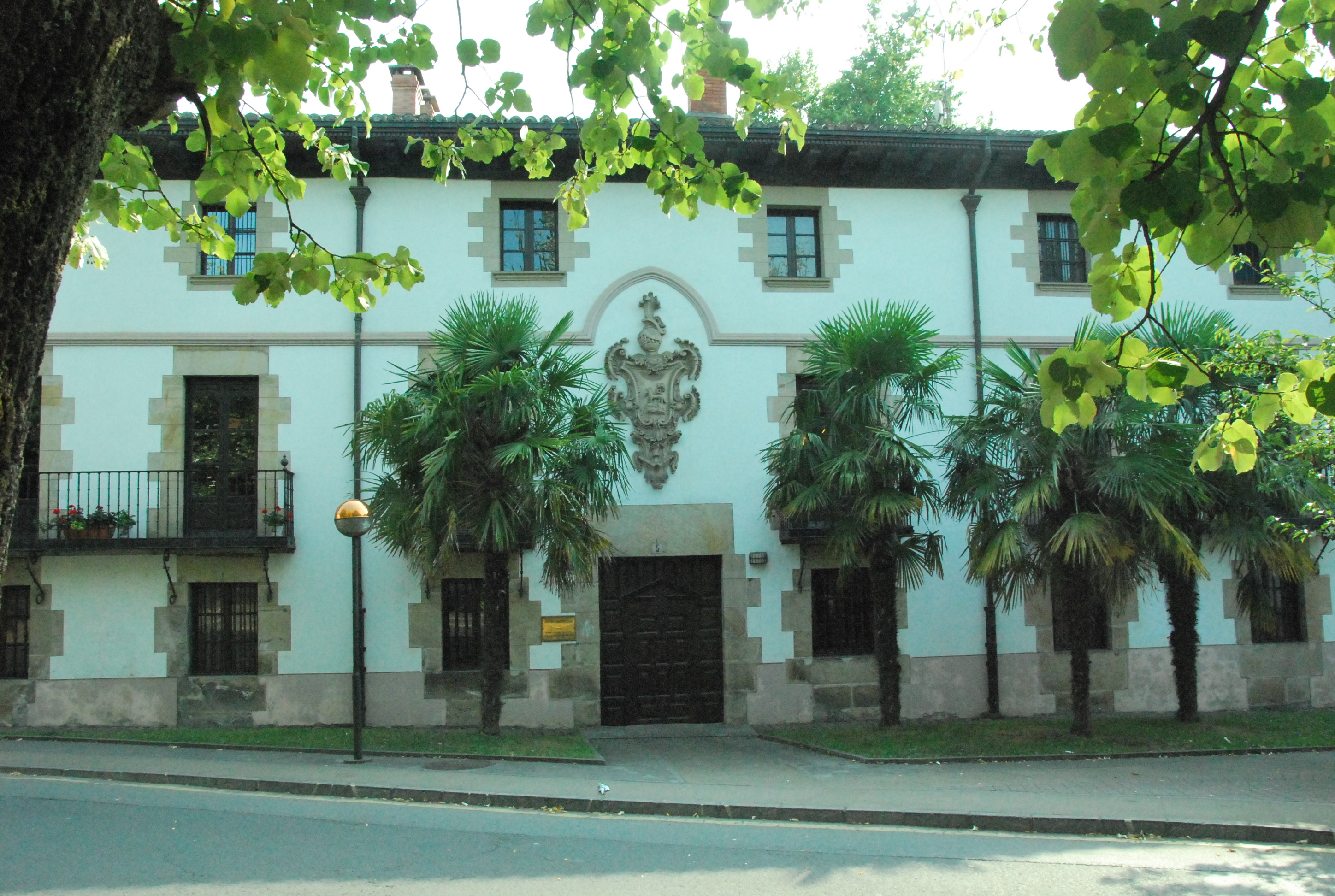 Oñatiko Antixena jauregiaren aurrekaldea